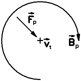 Poloidse magnetvälja mõju liikuvale laengukandjale